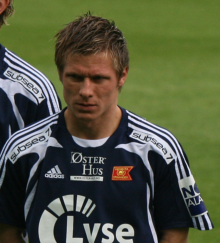 Trond Erik Bertelsen